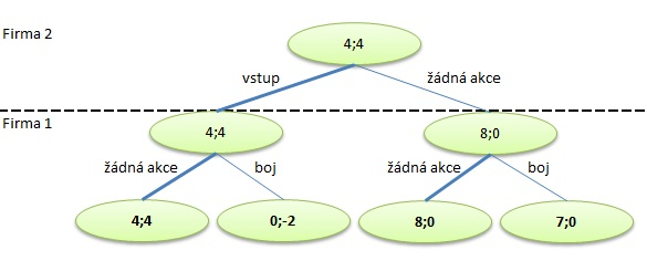 Rozšířená forma hry - Konflikt dvou firem - Firma2, Firma1 Modifikace příkladu z publikace: DLOUHÝ, Martin; FIALA, Petr. Úvod do teorie her. 2.přepracované vydání. Vysoká škola ekonomická v Praze : Nakladatelství Oeconomica, 2009. 120 s. ISBN 978-80-245-1609-7.